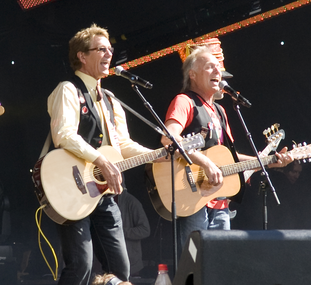 Knutsen og Ludvigsen opptrer på VGs sommerturne på Rådhusplassen i Oslo.